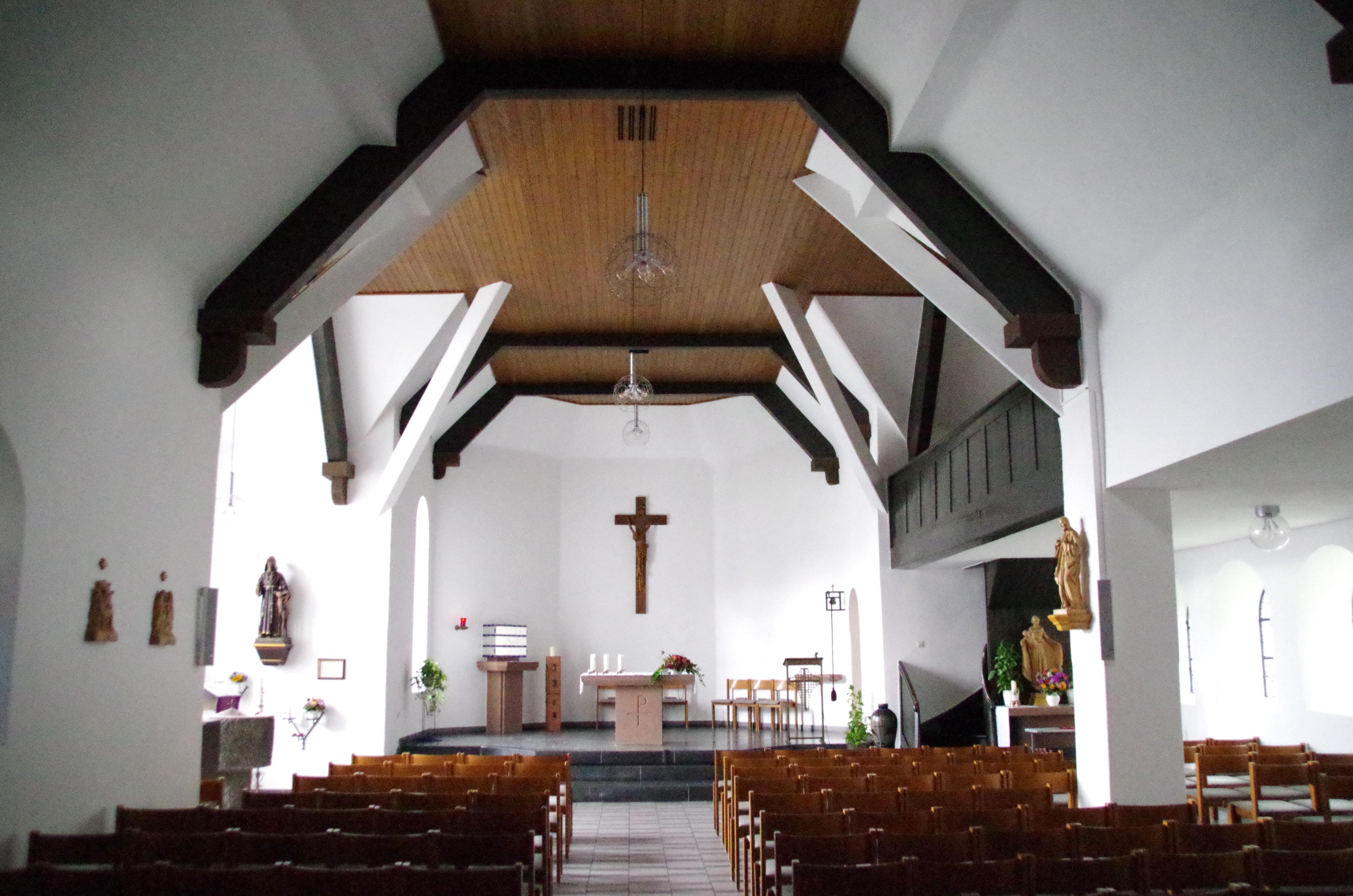 St. Ägidius (Wolfert), Innenraum mit Blick zum Altar